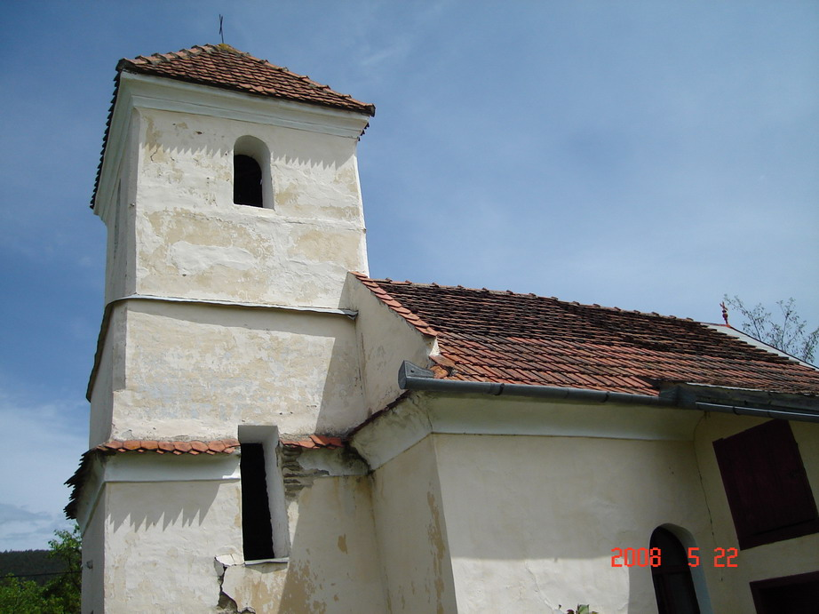 Kurtapataki kápolna, Erdély